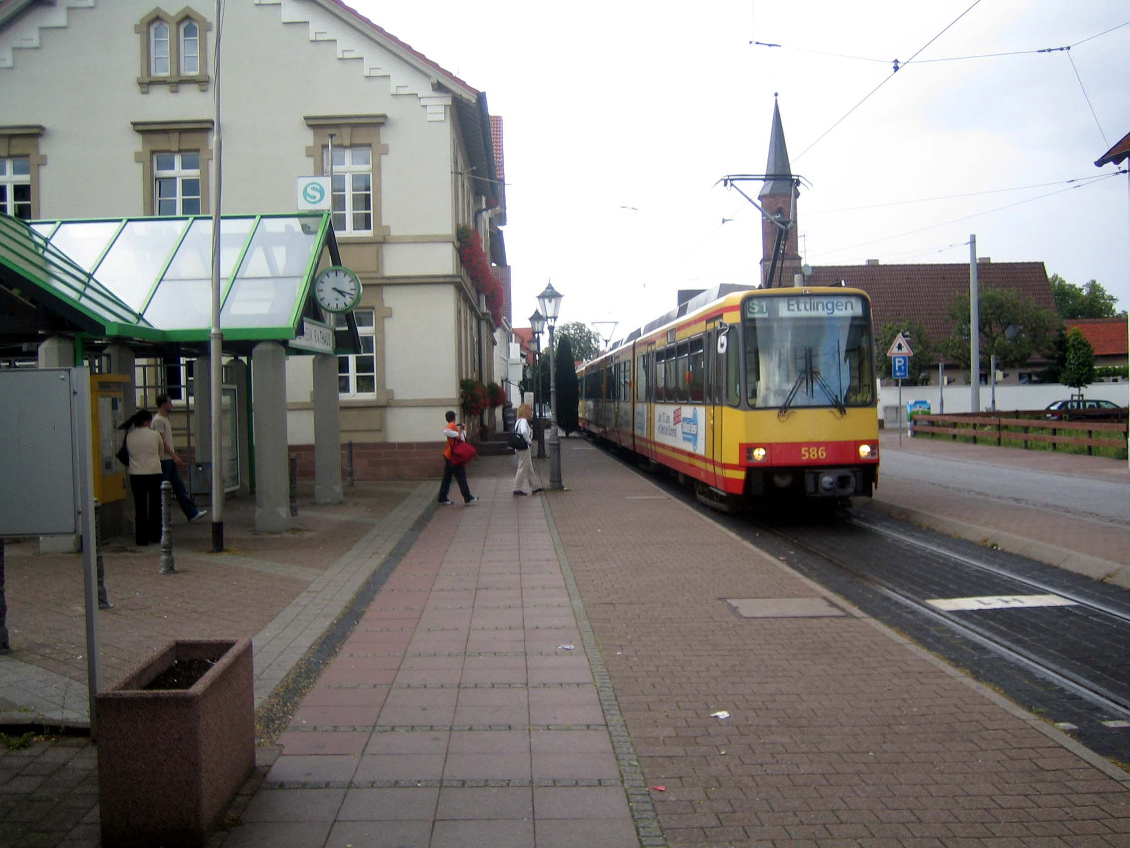 Haltestelle "Linkenheim Rathaus", selbst fotografiert 17:58, 8. Aug 2005 Antifaschist 666 2272 x 1704 (862445 Byte) (Haltestelle "Linkenheim Rathaus", selbst fotografiert)